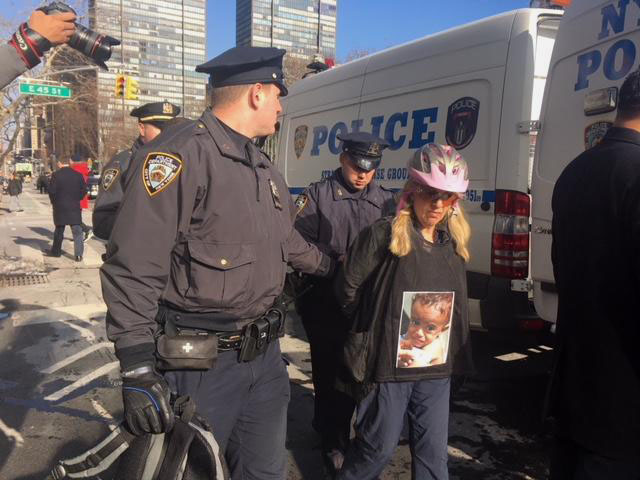 156 Arrests